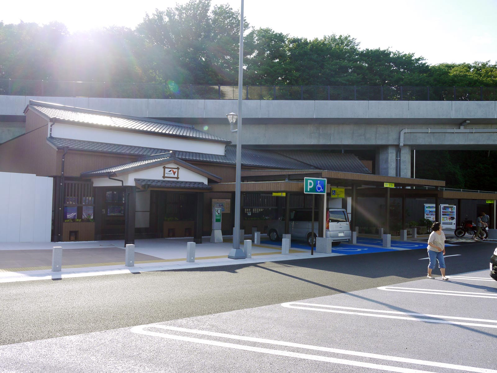 圏央道厚木PA